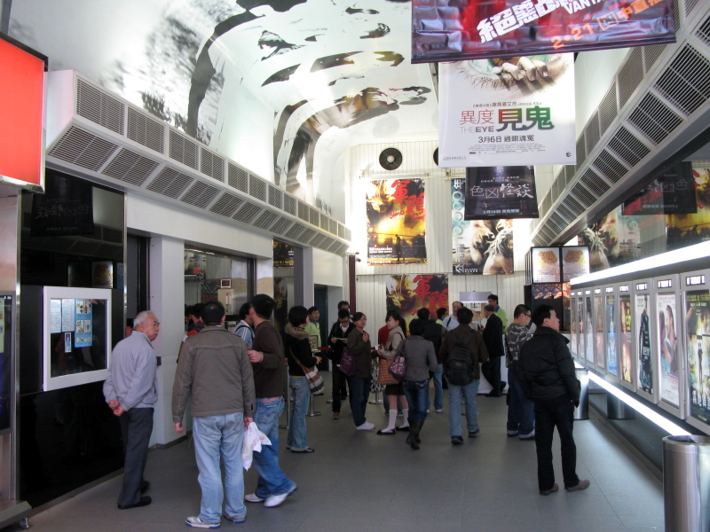 HK Broadway Mong Kok